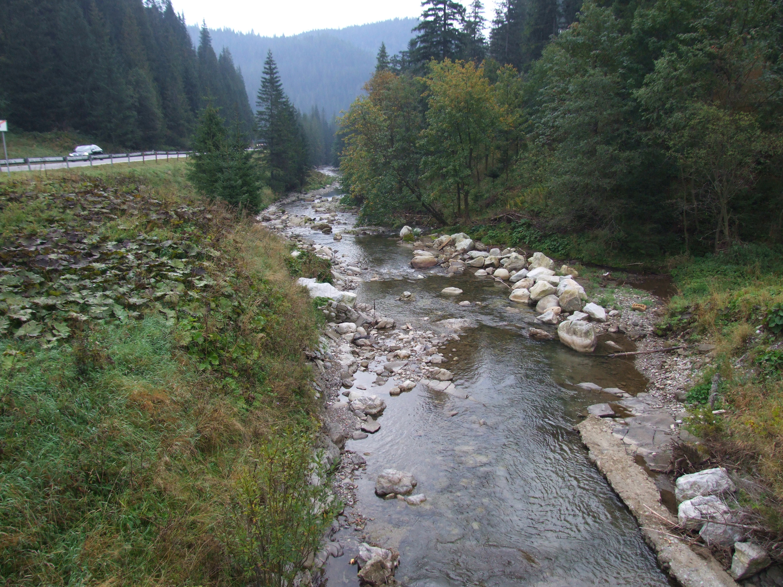 Bielski Potok i Dolina Kotliny